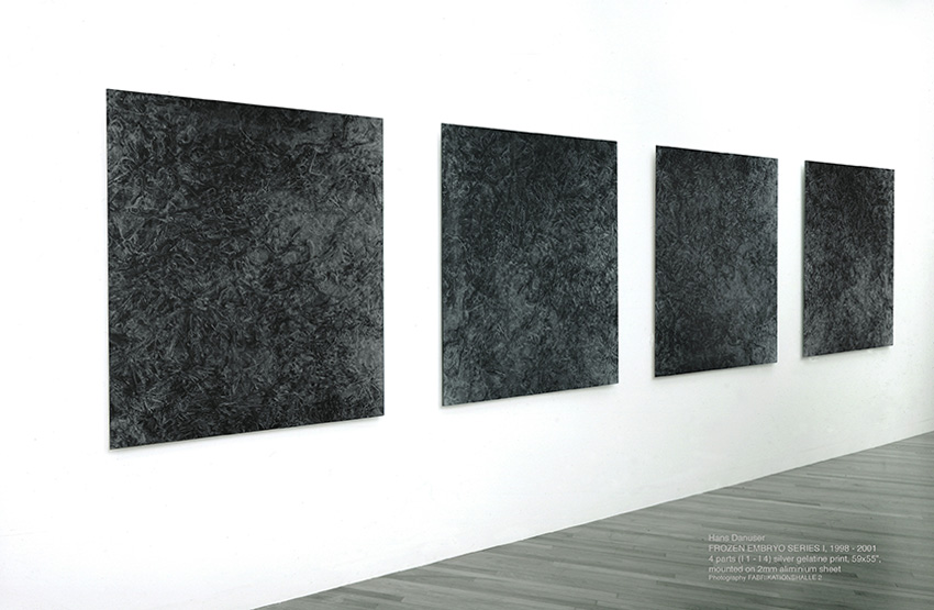 Werkserie von Hans Danuser, Frozen Embryo Series I, 1998–2001, 4 parts (I1–I4), silver gelatine print, 59x55 cm, mounted on 2mm aluminium sheet, photography: Fabrikationshalle 2